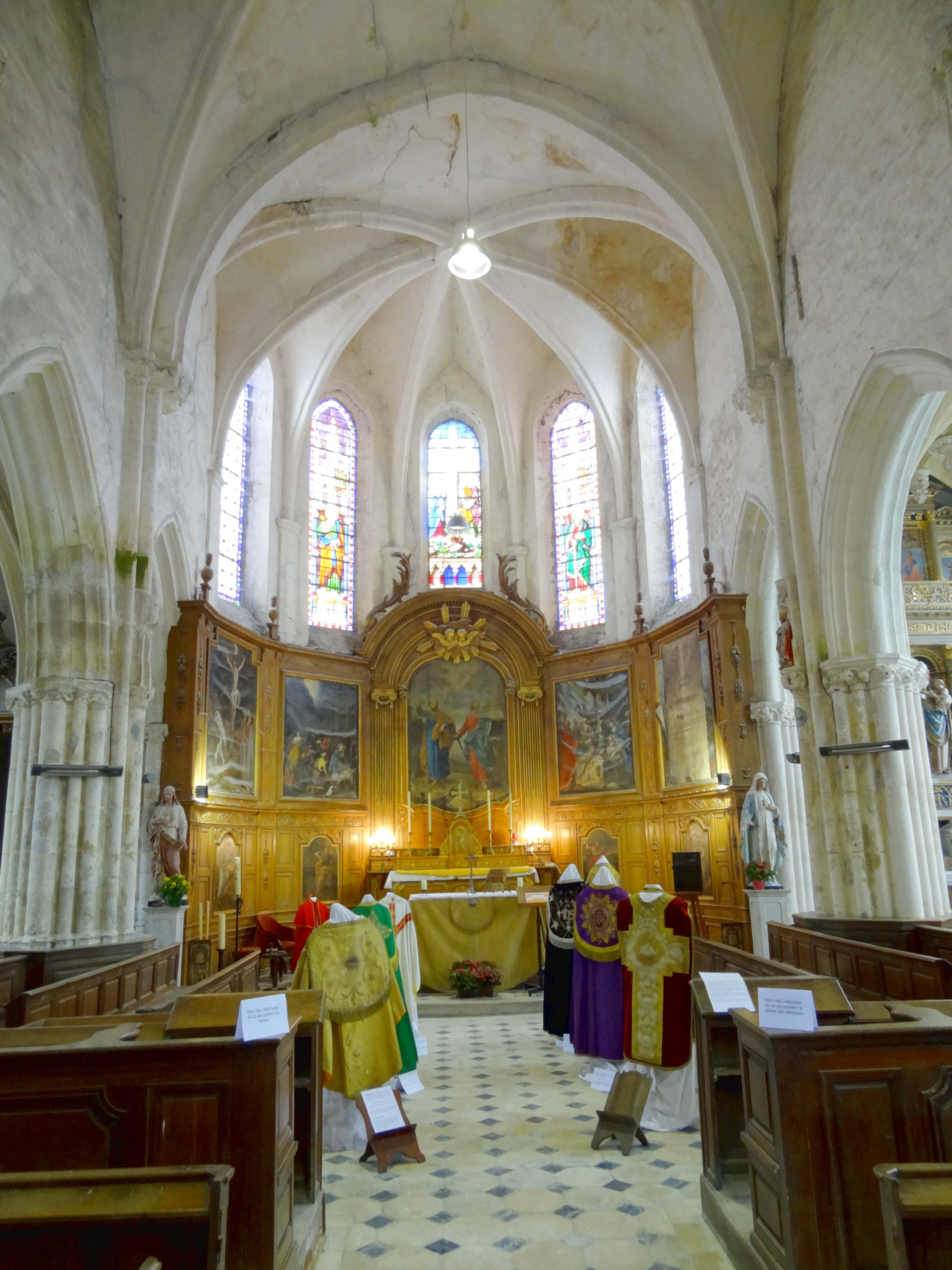 Intérieur de l'église - voir titre.